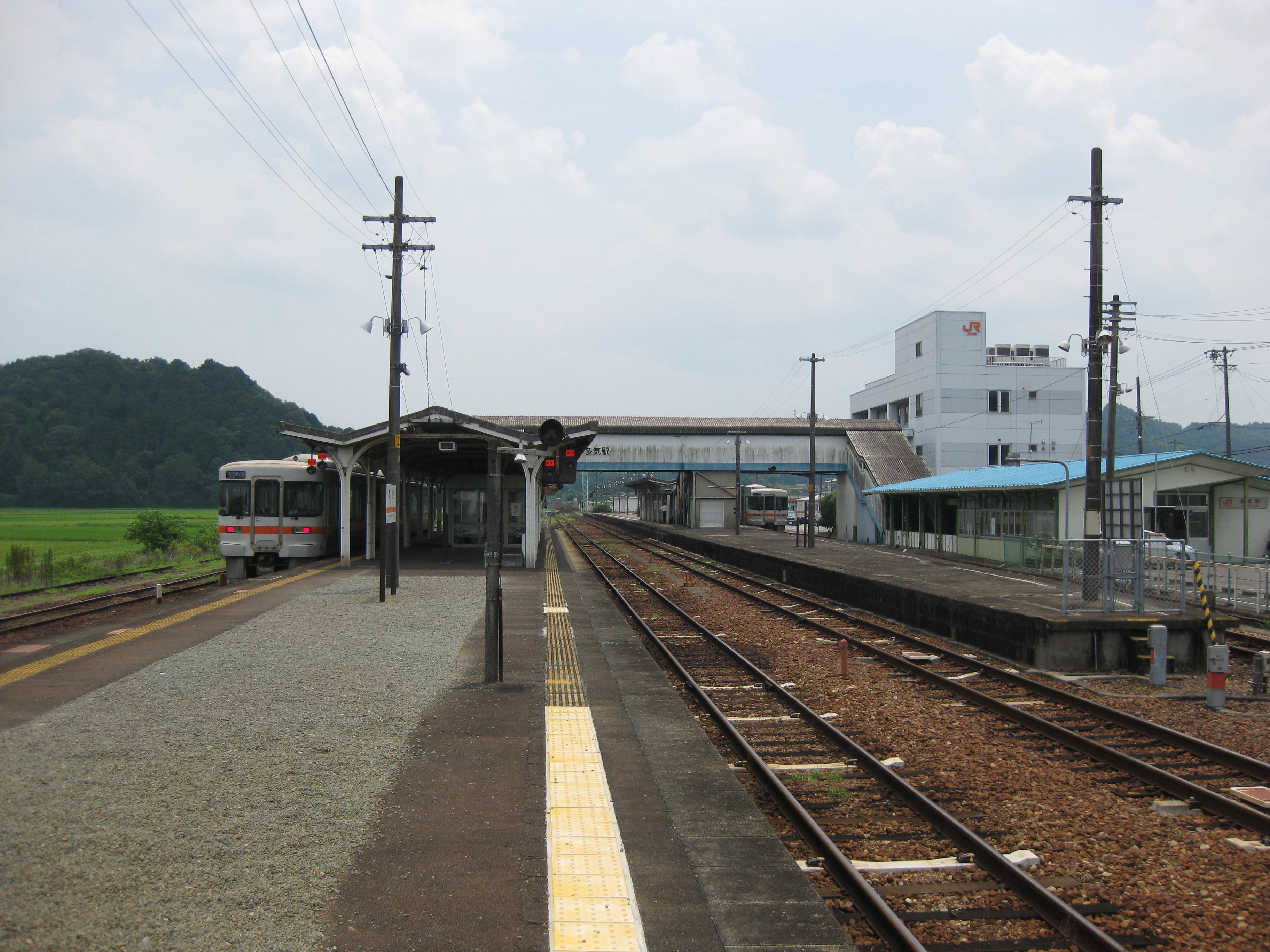 多気駅プラットホーム